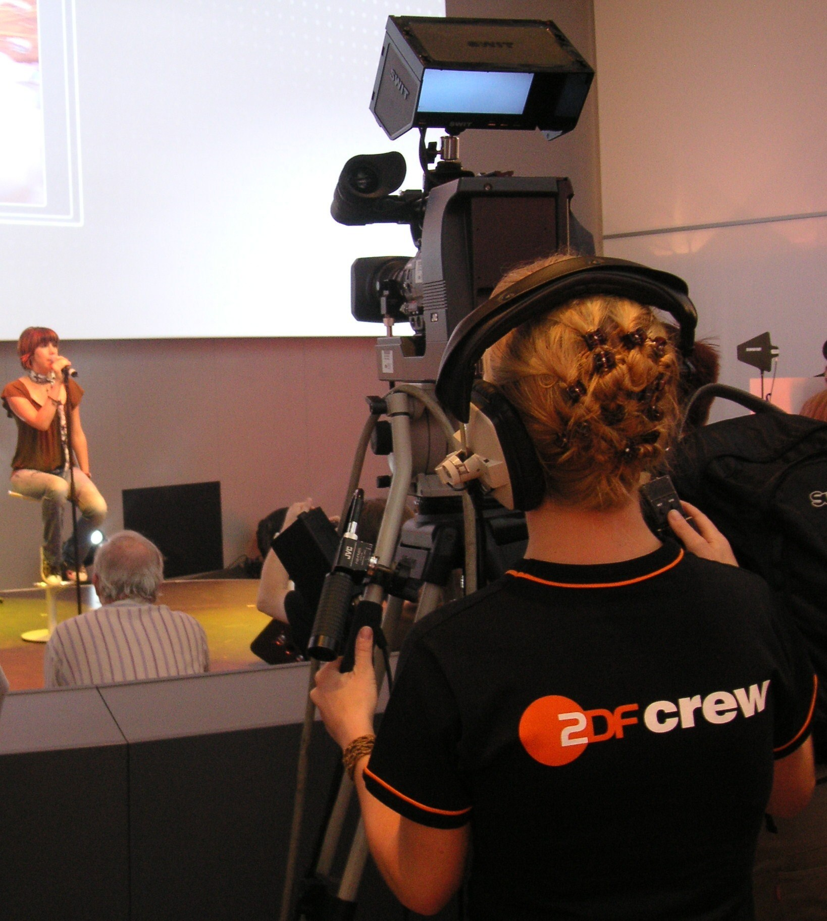 Professionell tv-kamera på "Funkausstellung" i Berlin